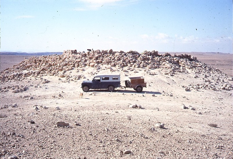 ראשון הג'יפים בסקר החרום של ישראל